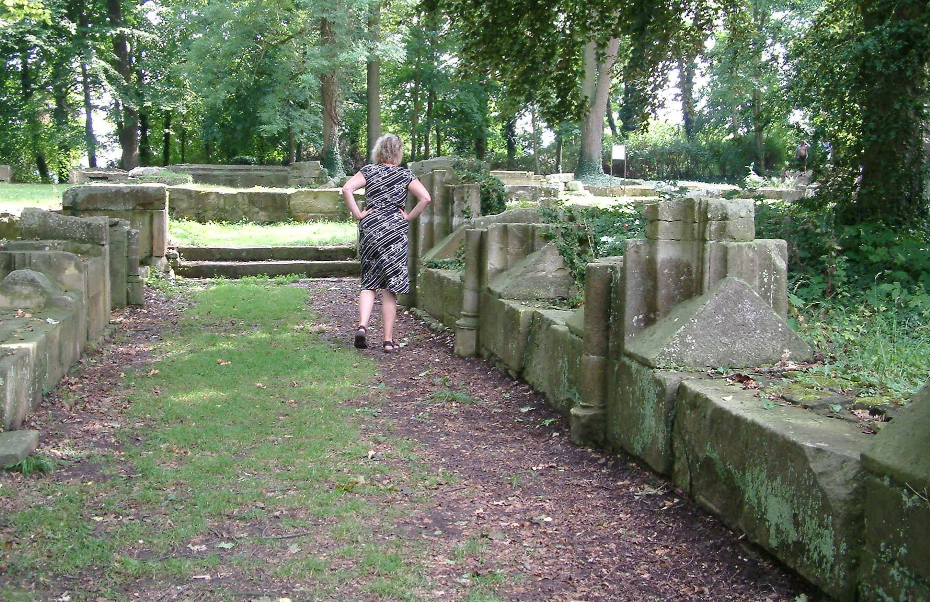 Kreuzgang der Klosterruine Disibodenberg